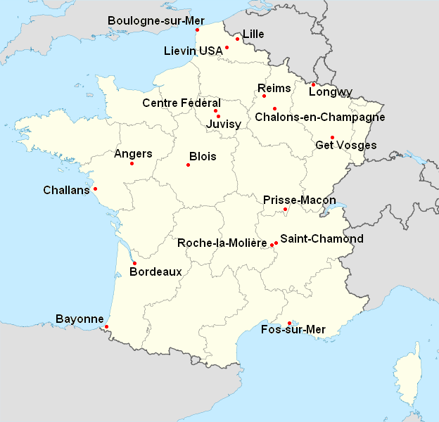 Clubs participants à la Nationale 1 Masculine 2008-2009